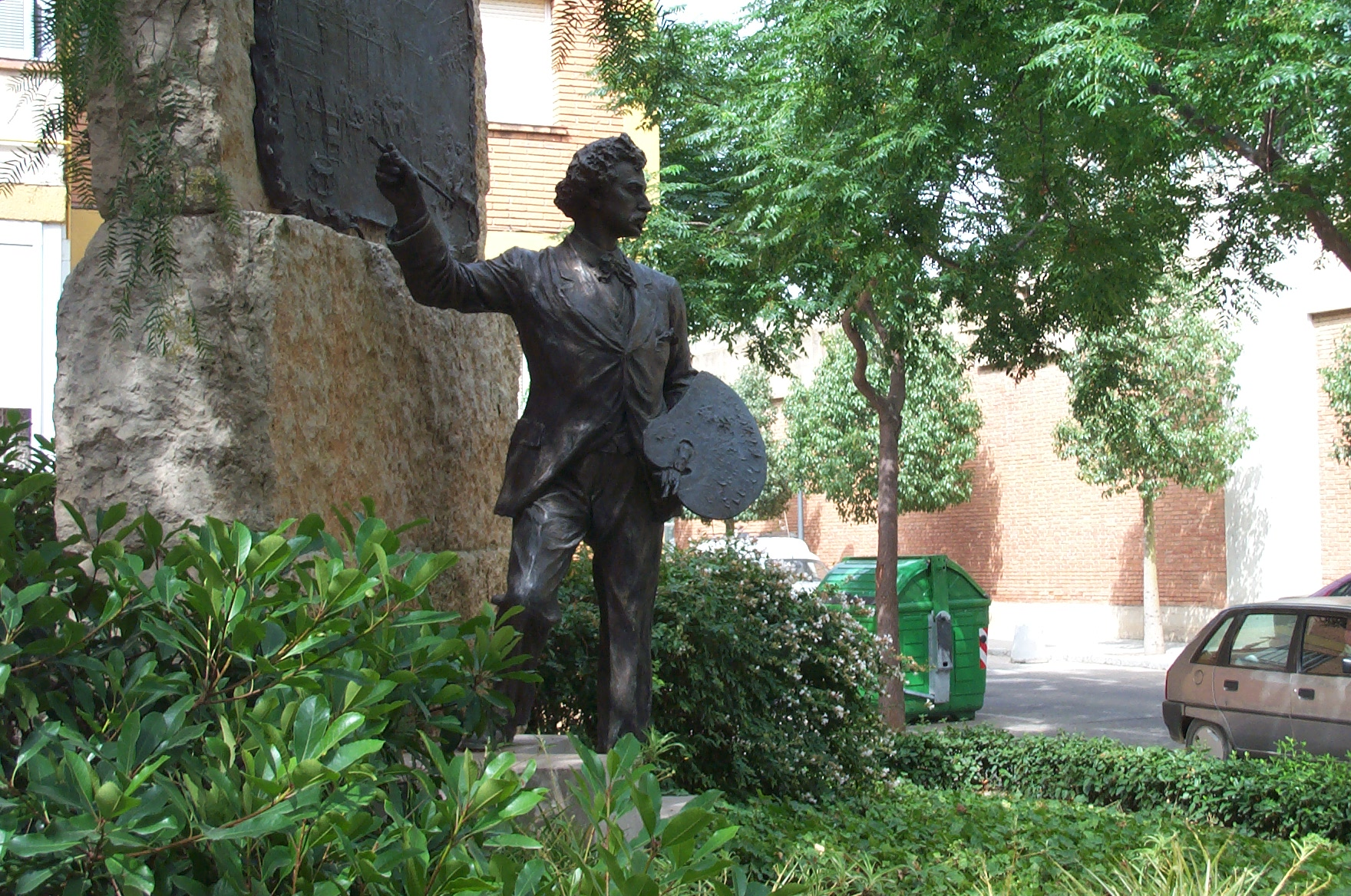 monumento a Marià Fortuny en el Barrio Fortuny de Reus